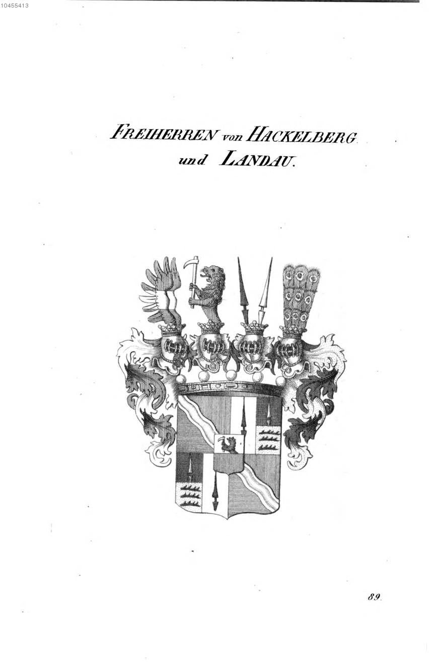 Wappen Hackelberg und Landau - Tyroff AT.jpg